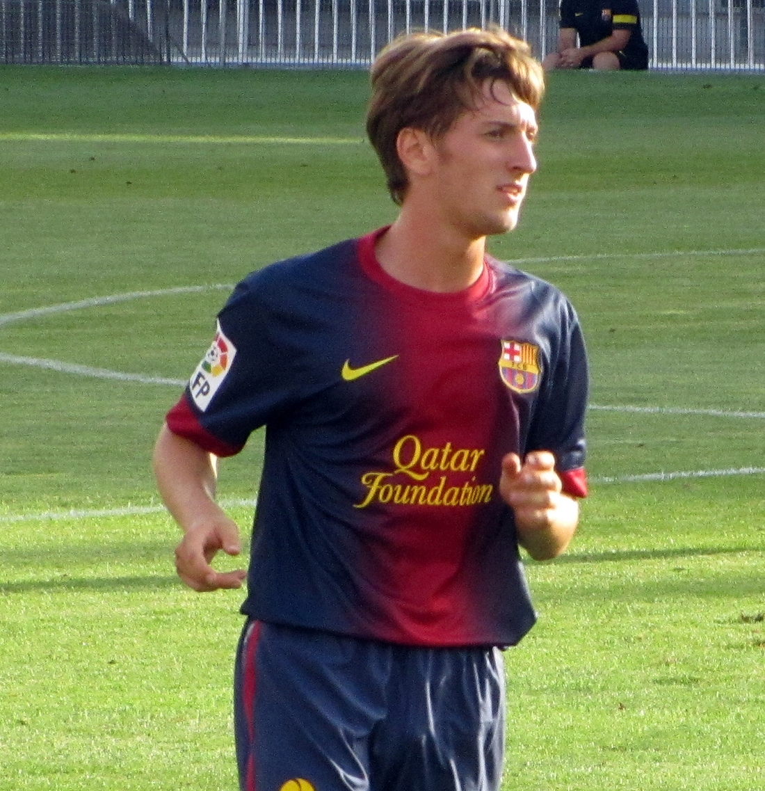 FC Barcelona B player Ivan Balliu in a 2012-13 home kit. Foto realizada por Javier Segura (@castroquini)